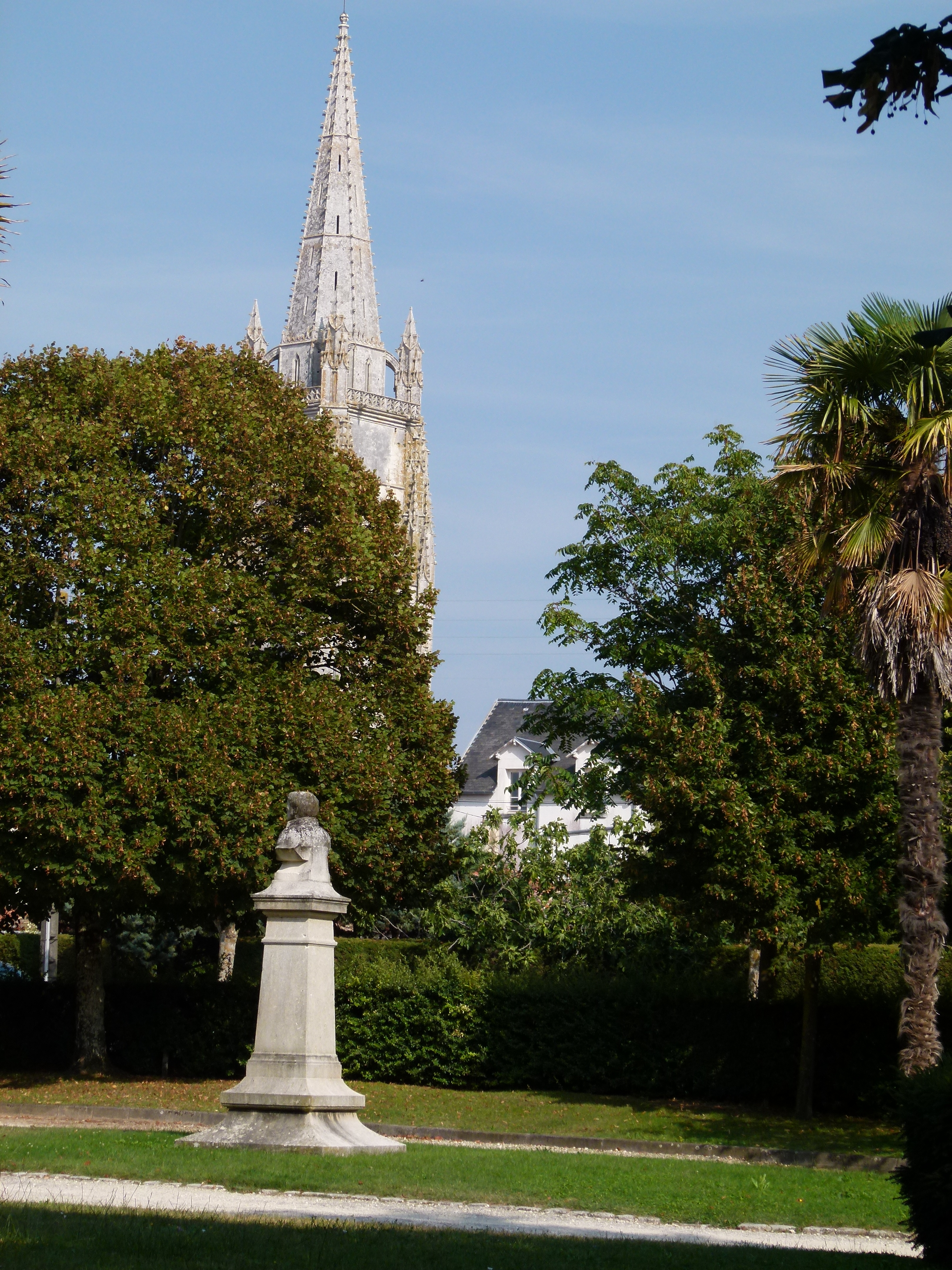 Le jardin public de Marennes avec la statue de Charles-Esprit Le Terme, ancien sous-préfet de Marennes, et au fond le clocher-porche de l'église de Marennes (Charente-Maritime).